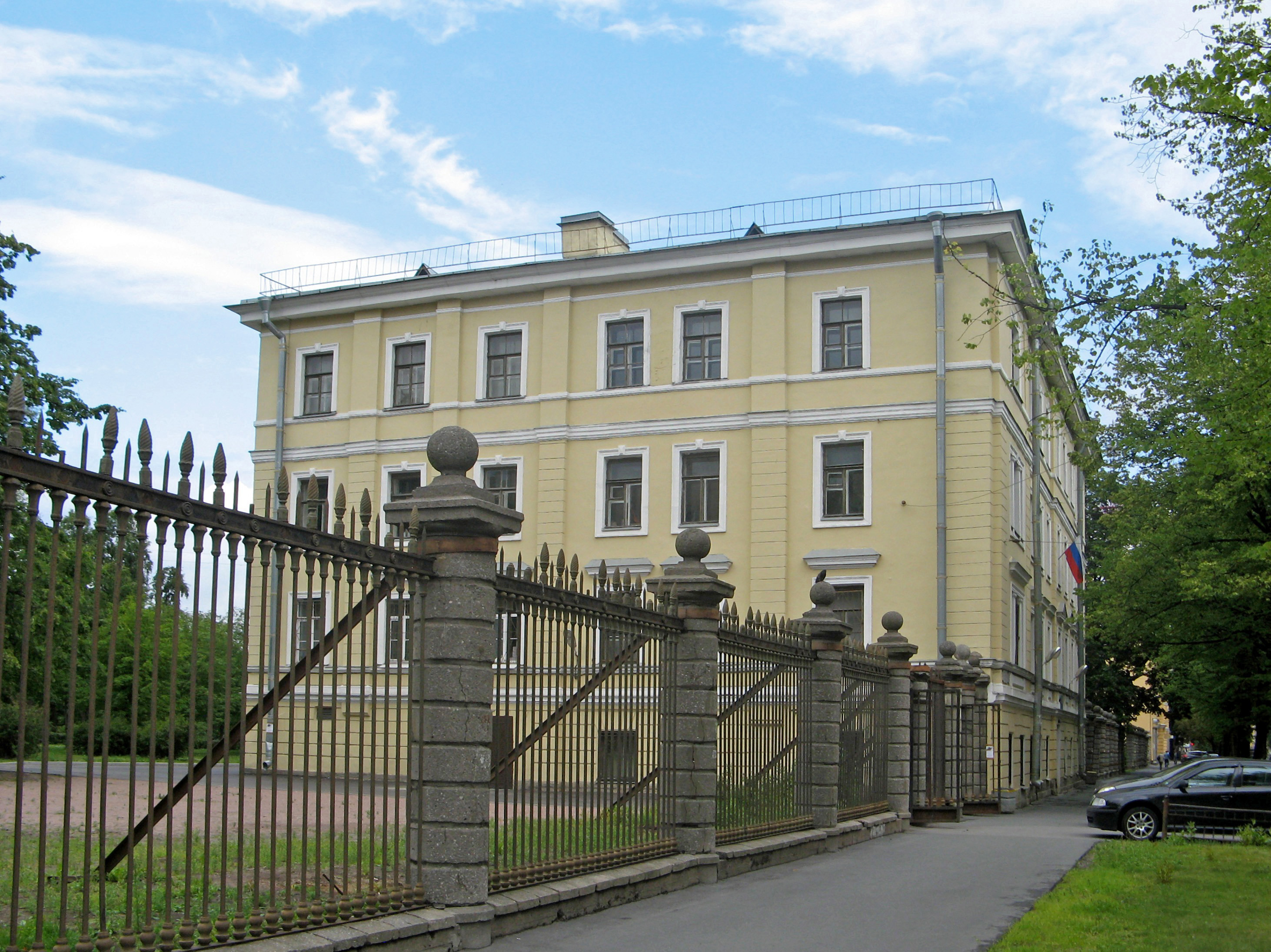 Санкт-Петербург, ул. Комиссара Смирнова, 17